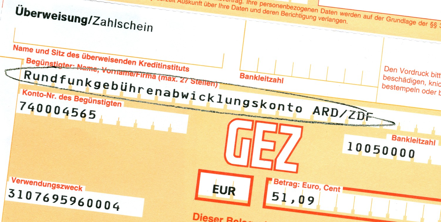 Rundfunkgebührenabwicklungskonto - a long German word (32 letters)